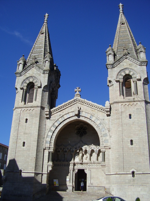 Lalouvesc - basilique Saint-Régis